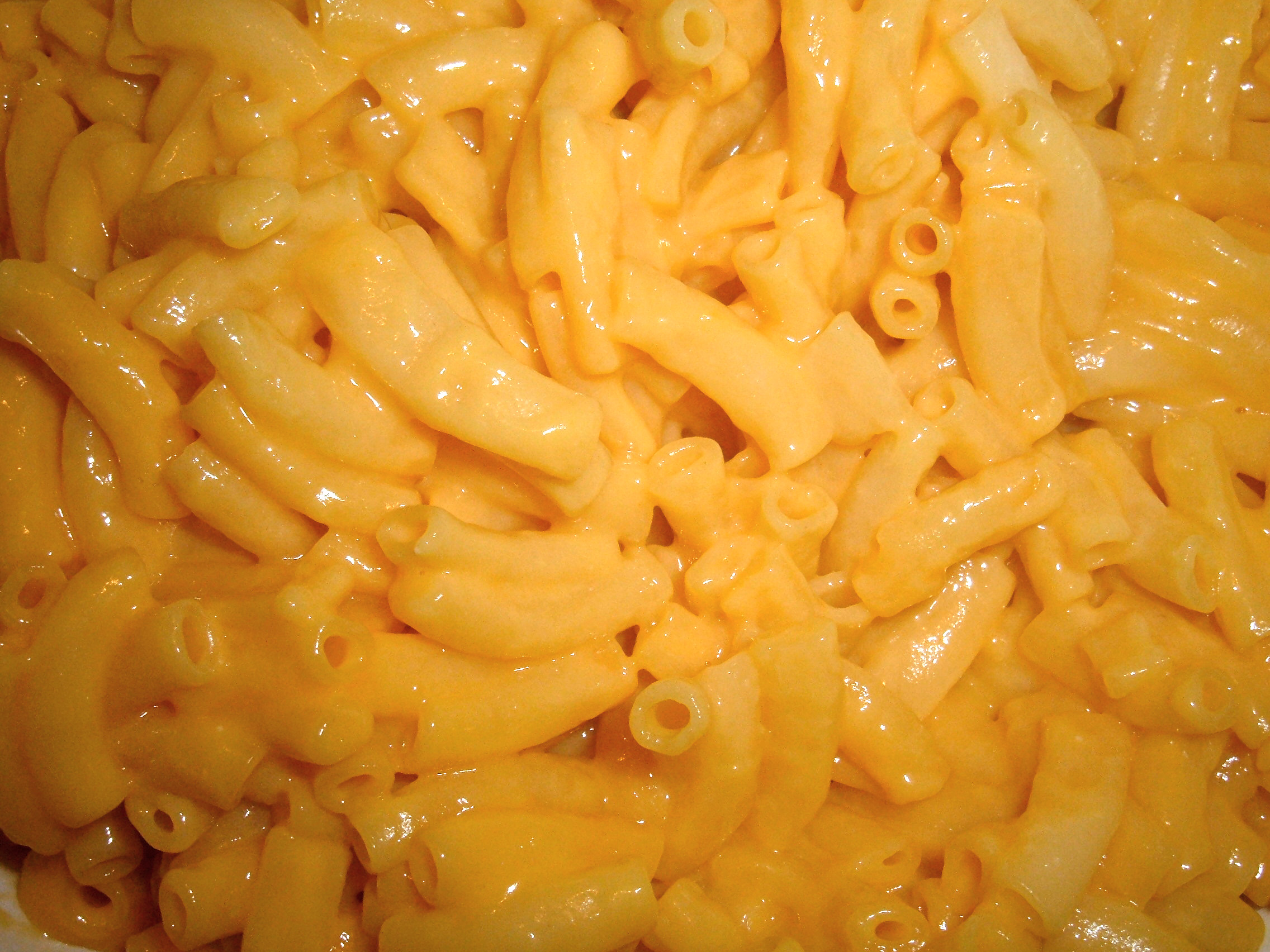 Kraft Easy Mac